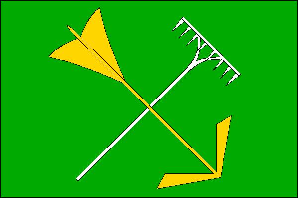 Vlajka obce Hrušovany u Brna